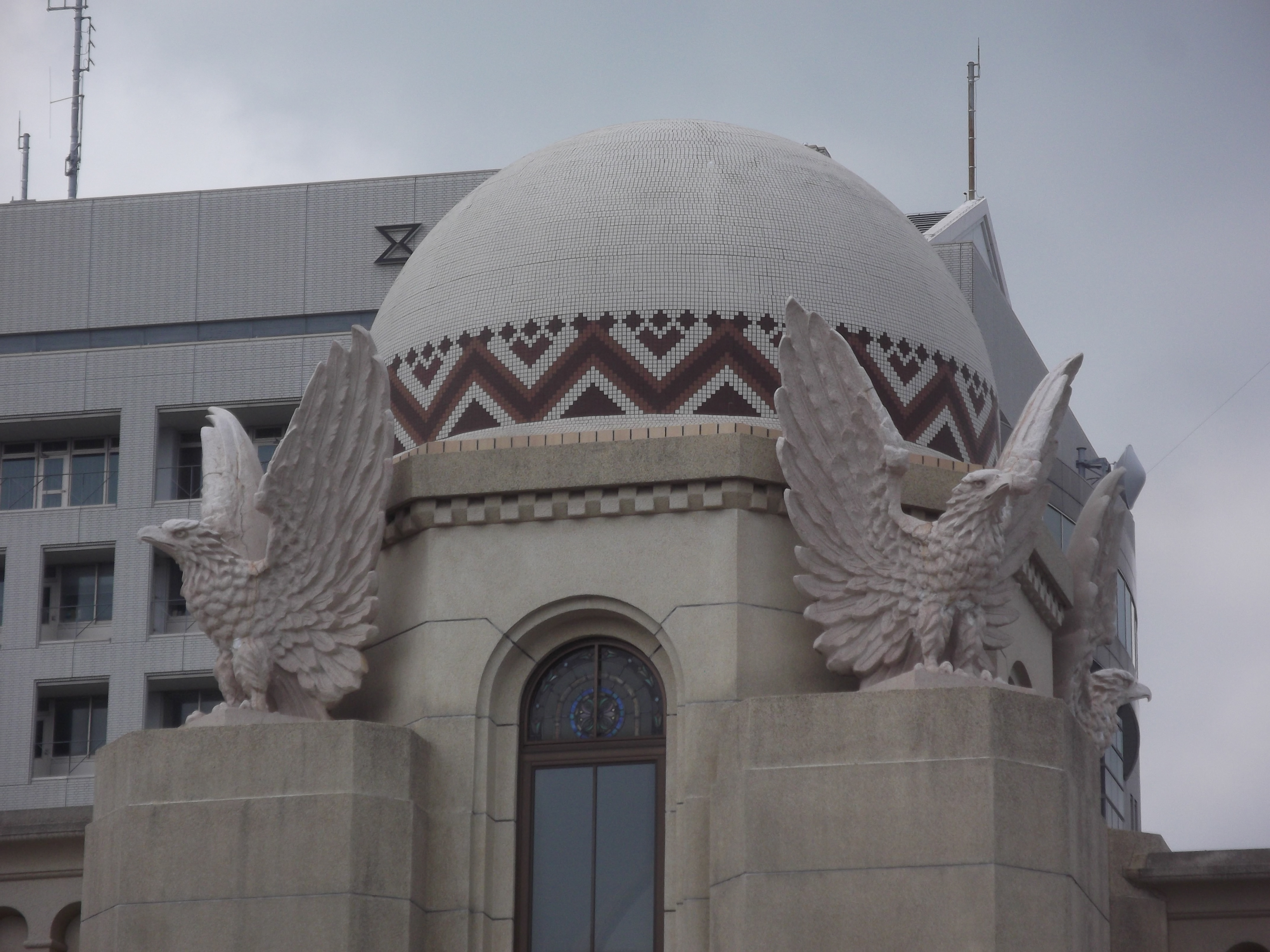 豊橋市公会堂のドーム部分のアップ画像。